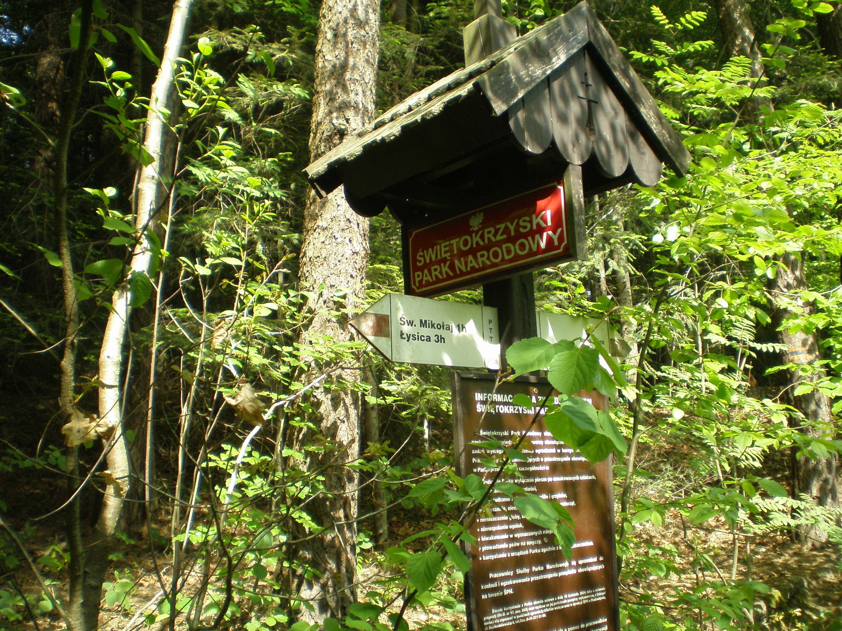 Czerwony szlak, między Łysą Górą a Łysicą